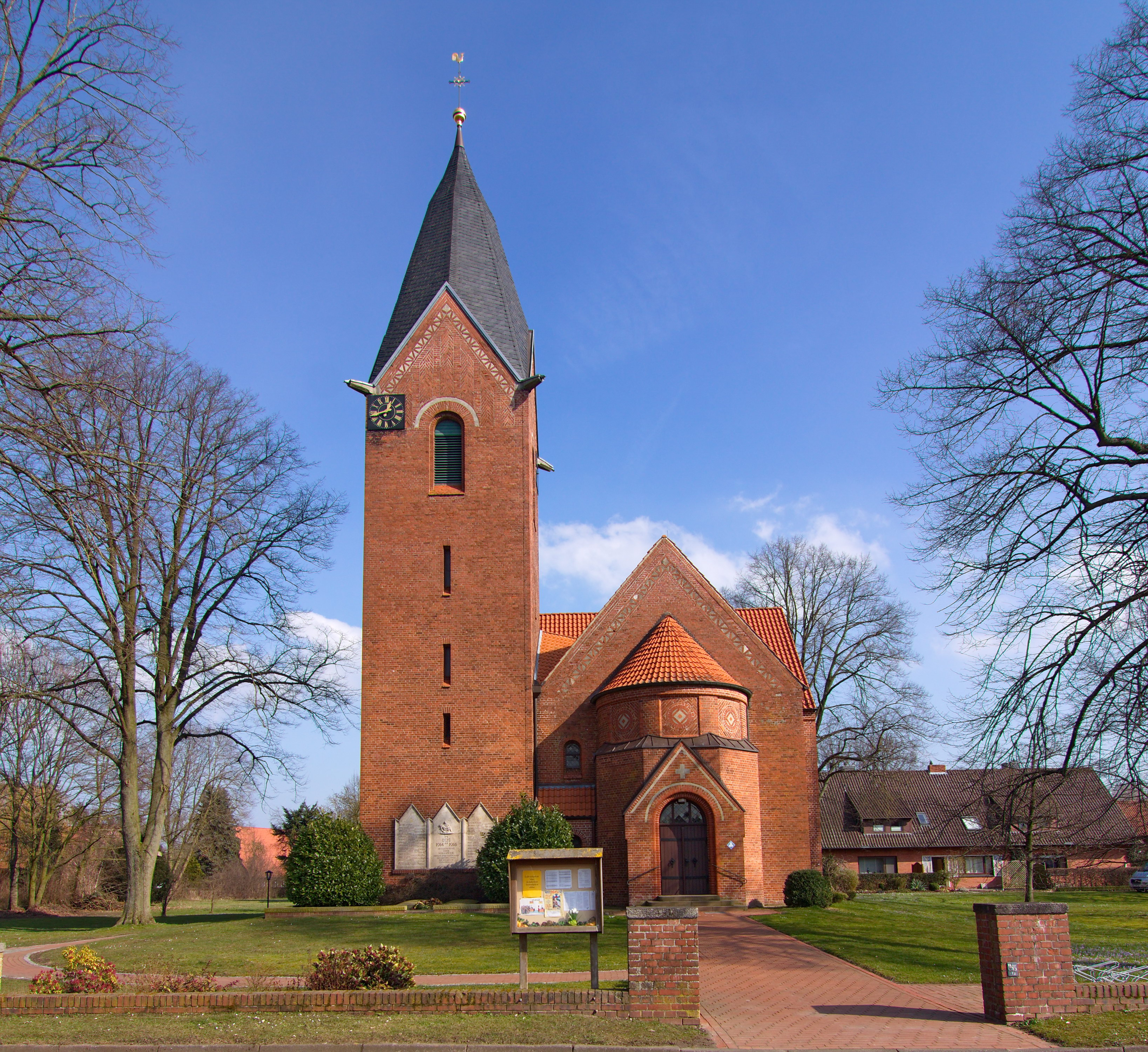 Die Backstein-Kapelle im neuromanischen Stil wurde 1922 in Schweringen, Niedersachsen, Deutschland eingeweiht.